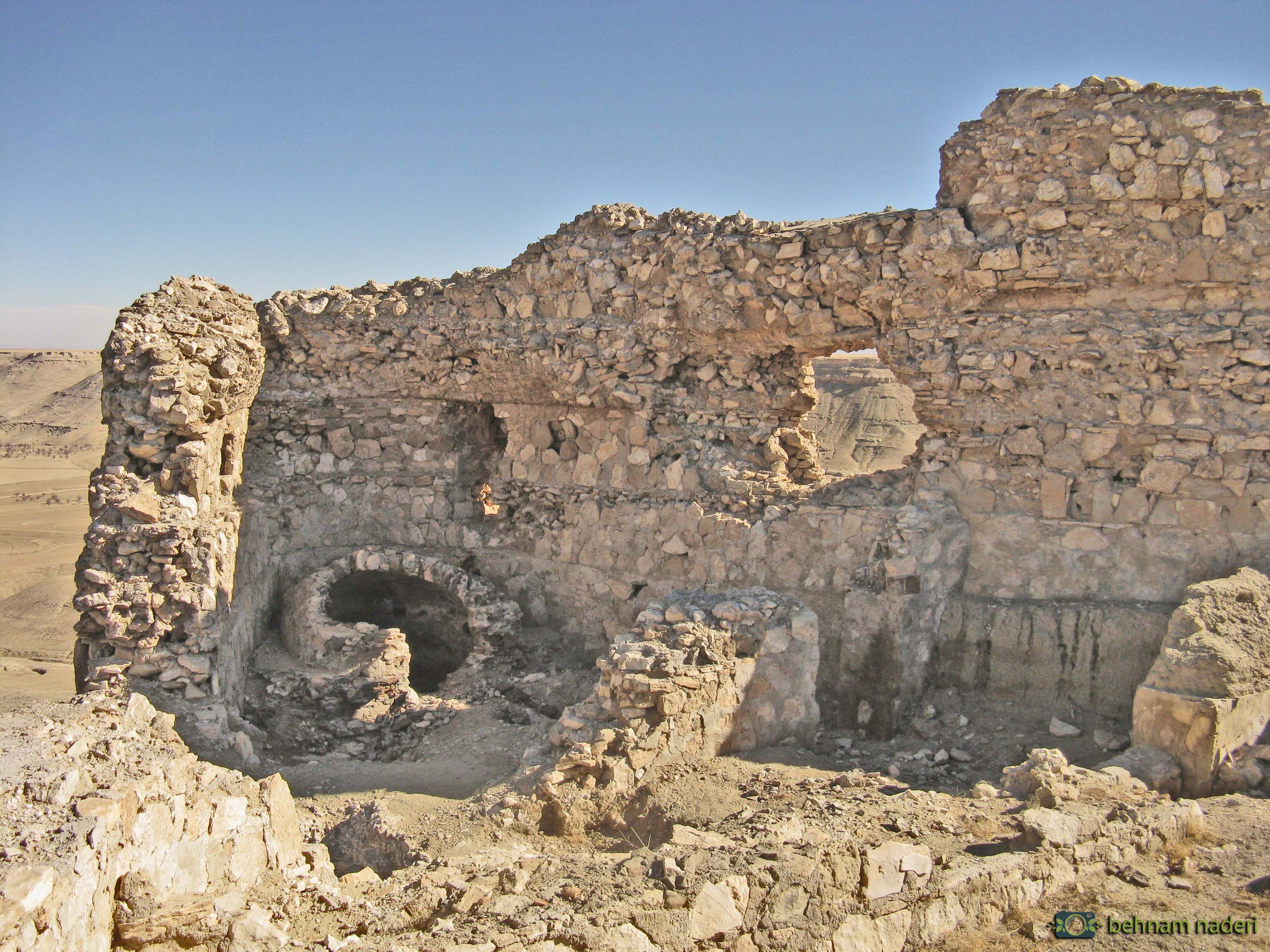 در تصویر شاهد آب انبار ومحل زندگی سربازان هستید